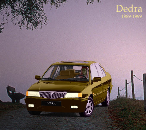 Lancia Dedra Fotomontage